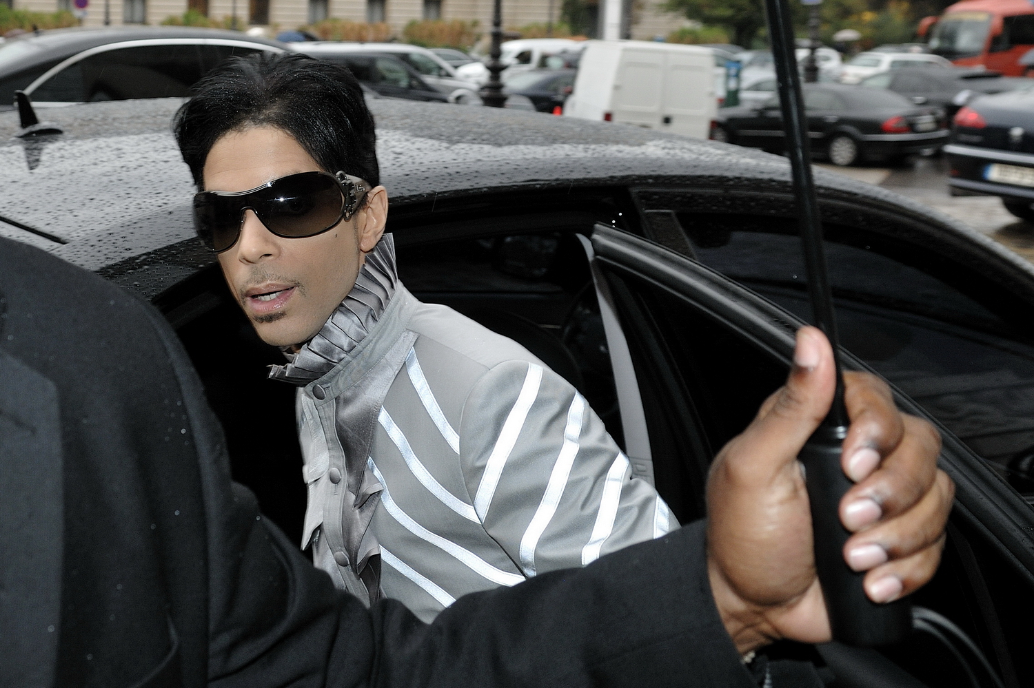 Défilé Channel printemps/été 2010 prêt-à-porter au Grand Palais (Avenue du Général Eisenhower - Paris 75008) Karl Lagerfeld a fait fort, en transformant le Grand Palais en étable géante. Des People en pagaille emmenés par Lily Allen (ambassadrice de la ligne Coco Cocoon) suivi de Bernadette Chirac, Claudia Schiffer, Rihanna, Virginie Ledoyen, Anna Wintour, Sean Lennon et Charlotte Kemp Muhl, Marie-Josée Croze, Prince accompagné de sa fiancée, et Irina Lazareanu, l'ex de Pete Doherty.